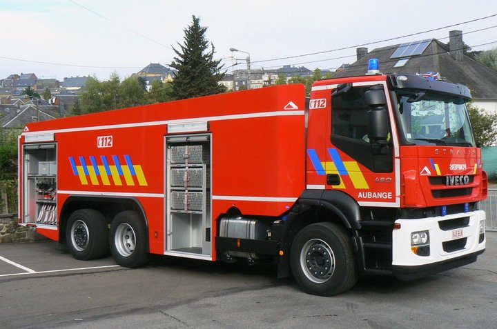 camion citerne 14000l SRI aubange